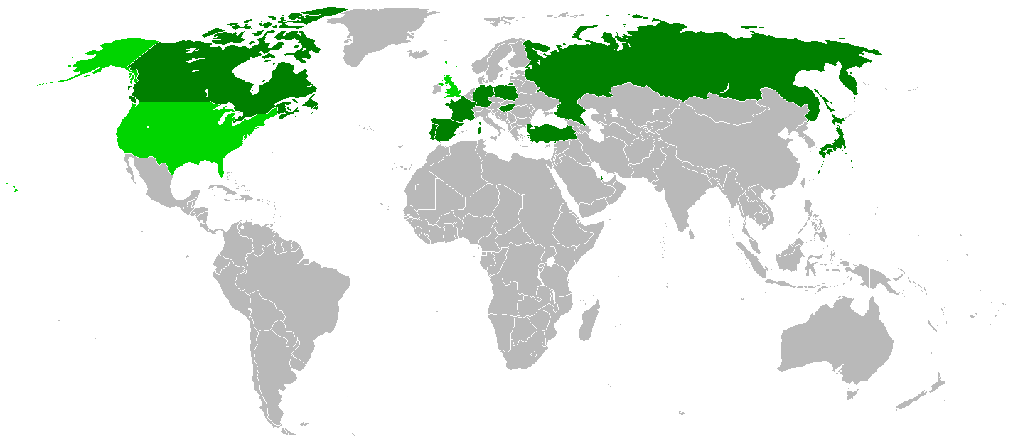 Kraje - organizatorzy halowych mistrzostw świata w lekkoatletyce. Kolorem jasniejszym oznaczono przyszłych ponownych organizatorów (USA 2016 i Wielka Brytania 2018)